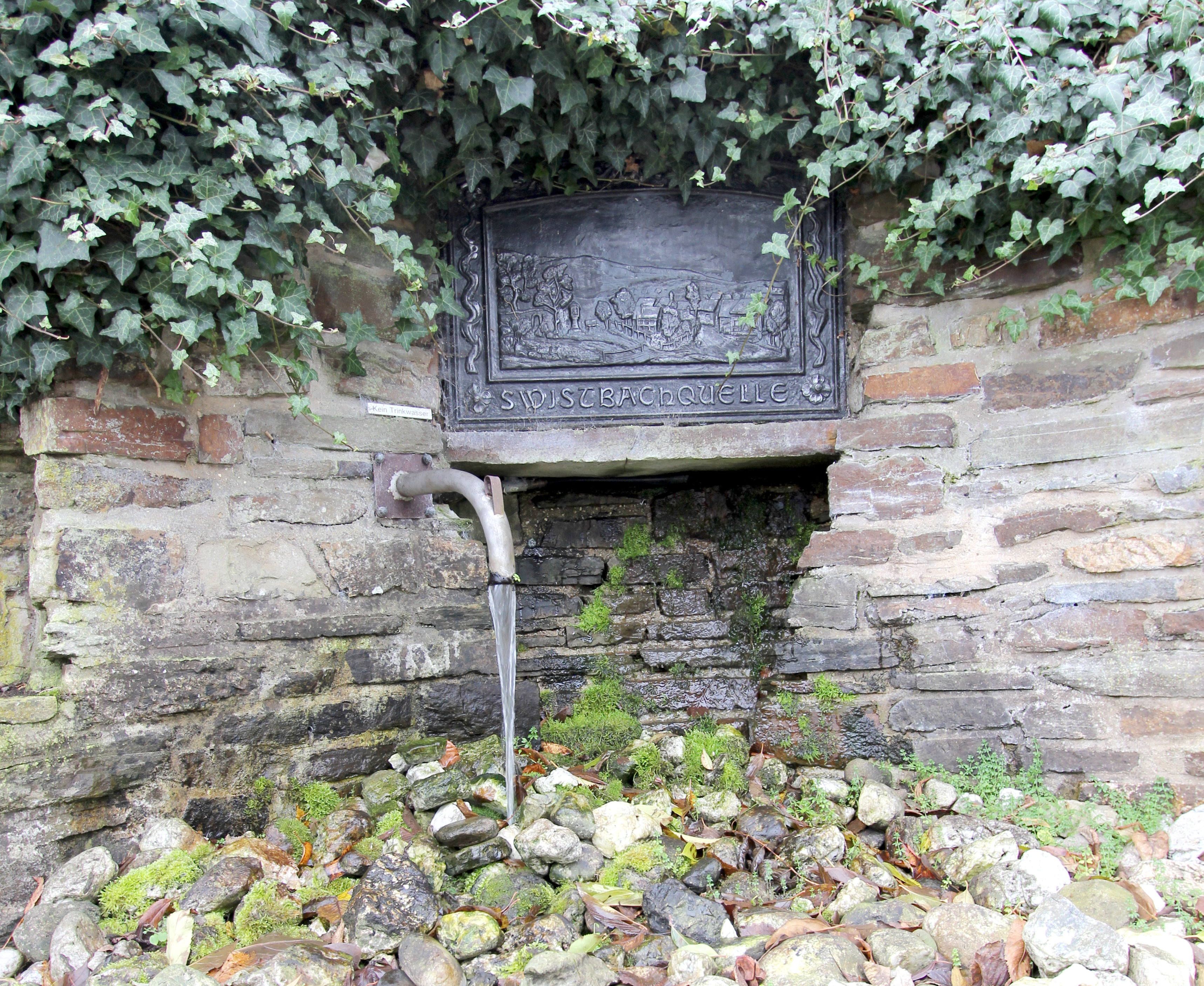 Kalenborn (Eifel, bei Altenahr), Hilberather Str. Ecke Brunnenstrasse. Mitten in Kalenborn plätschert die "unechte" Quelle, die mit Natursteinen eingefasst ist. Der Swistbach entspringt eigentlich in einem Quellgebiet, das sich zwischen Kalenborn und Hilberath befindet. Der Bach hat eine Länge von 43,6 KM und gilt als der längste Bachlauf Europas. Die Swist oder auch Swistbach genannt mündet zwischen Weilerswist und Bliesheim in die Erft. Aufnahme von 2017.